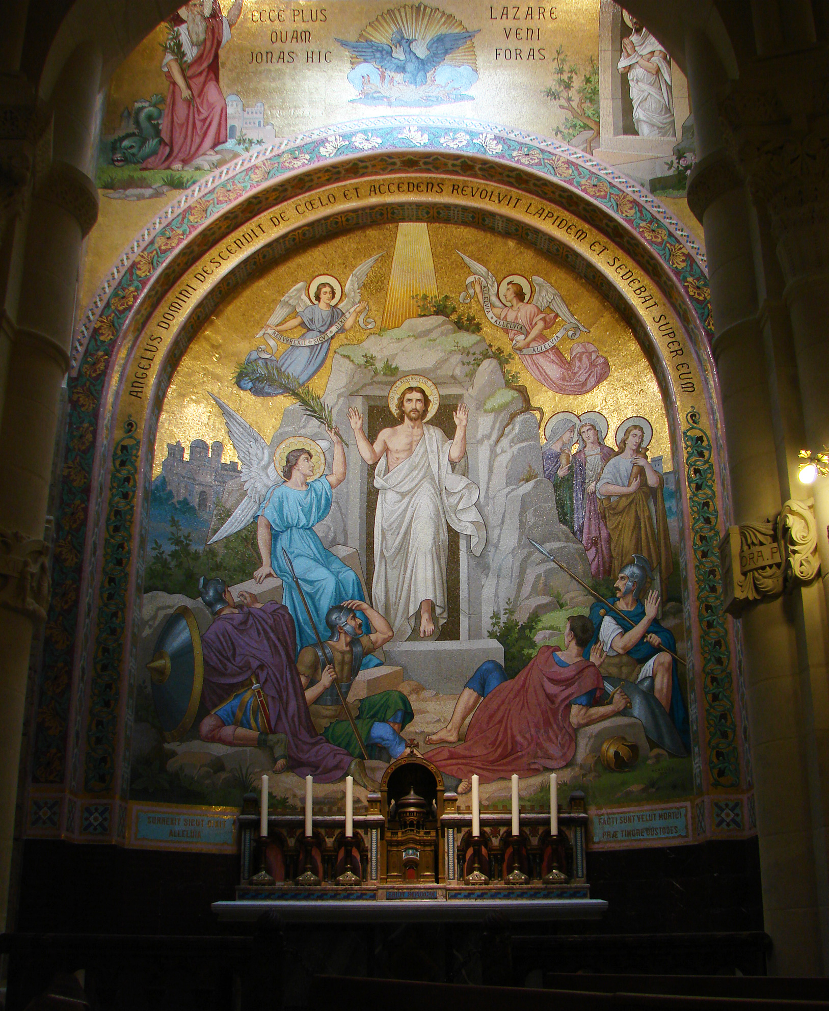 Mosaïque d'une des chapelles de la Basilique Notre-Dame du Rosaire (niveau inférieur):la Résurrection.